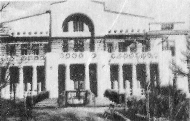 санаторий «Таласса» . Конец XIX в.